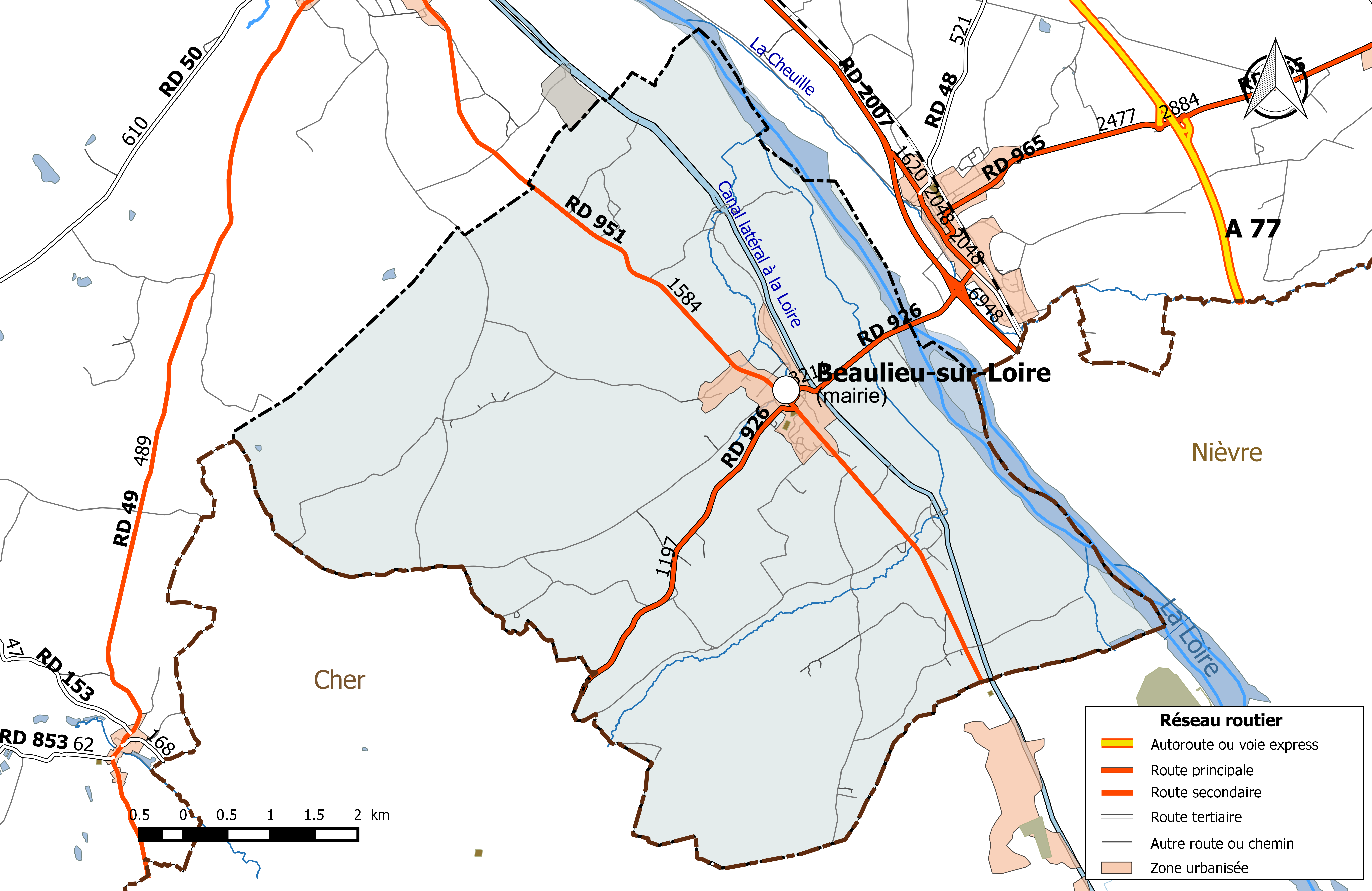 Carte du réseau routier de la commune de Beaulieu-sur-Loire.